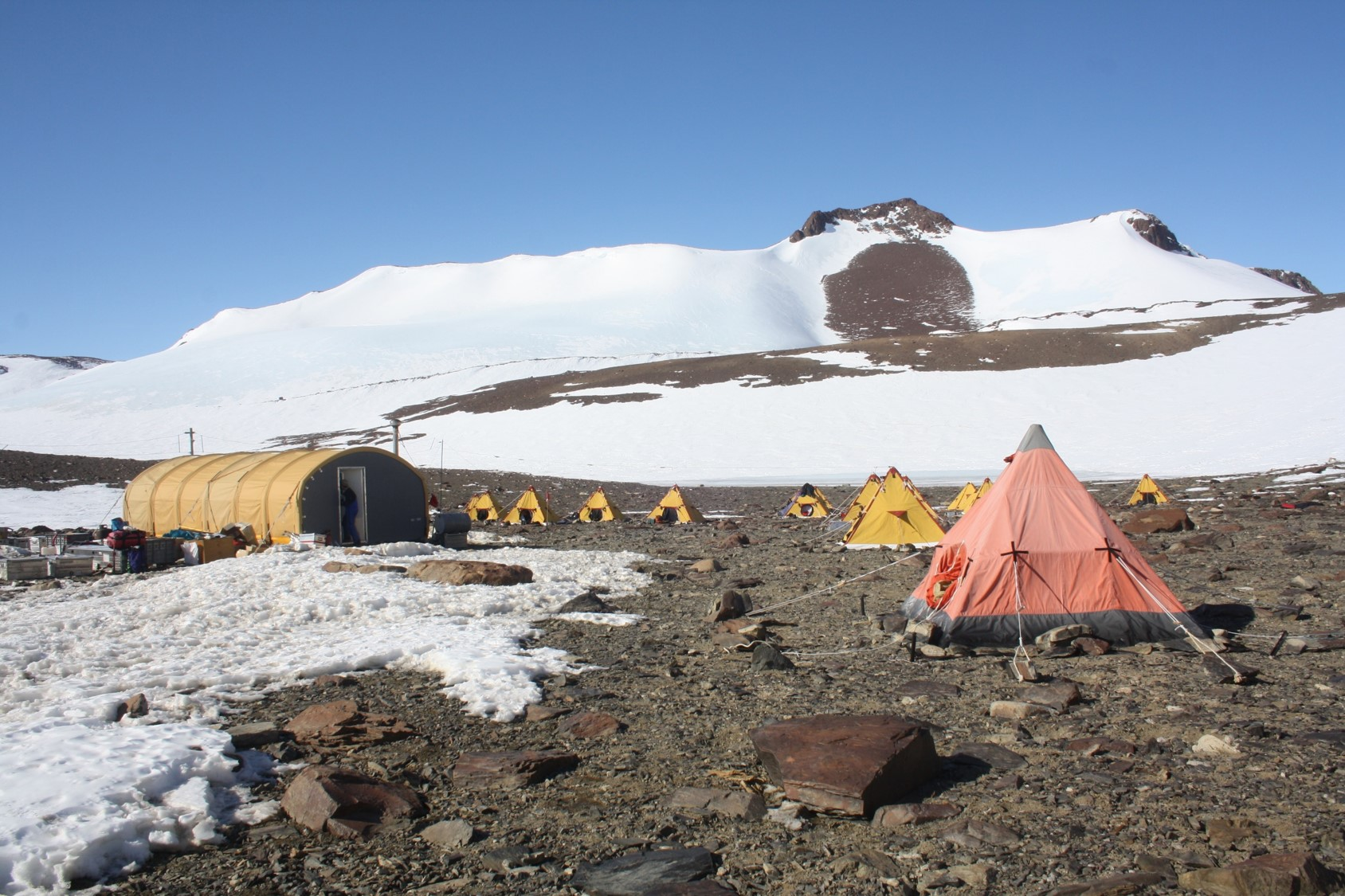 Wer glaubt, dass es in unserer globalisierten Welt keine Abenteuer für Forscher mehr gibt, der kann sich eines Besseren belehren lassen und sich an einer Expedition in die Antarktis beteiligen. Für die Expedition GANOVEX 11 sind im Dezember 2015 drei Forscher des DLR-Instituts für Planetenforschung in Berlin in Richtung Südpol aufgebrochen, um für die internationale Planetenforschung noch unbekannte antarktische Gebiete zu erkunden und gemäß ihrer geologisch-geomorphologischen Besonderheiten mit Strukturen auf dem Mars zu vergleichen. Zur Blogreihe #ExpeditionAntarktis